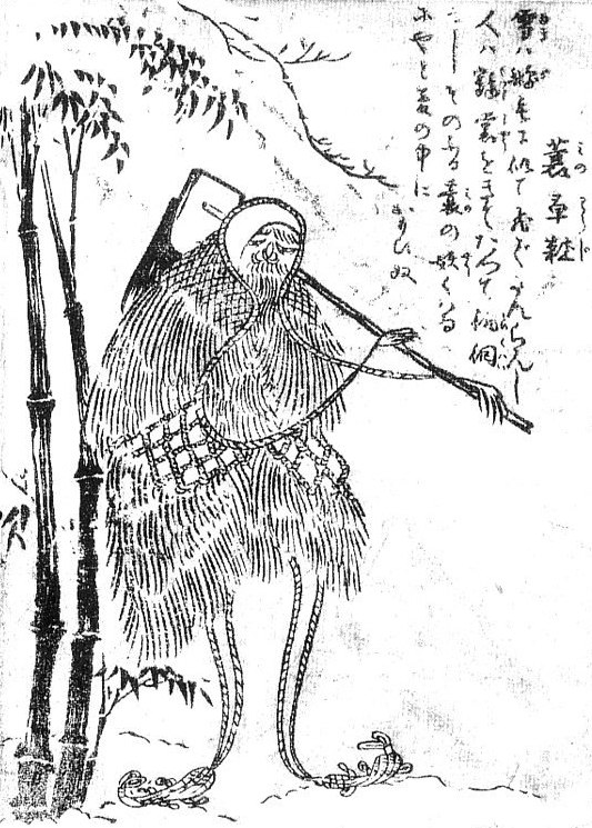 Minowaraji (蓑草鞋) from the Gazu Hyakki Tsurezure Bukuro (百器徒然袋)